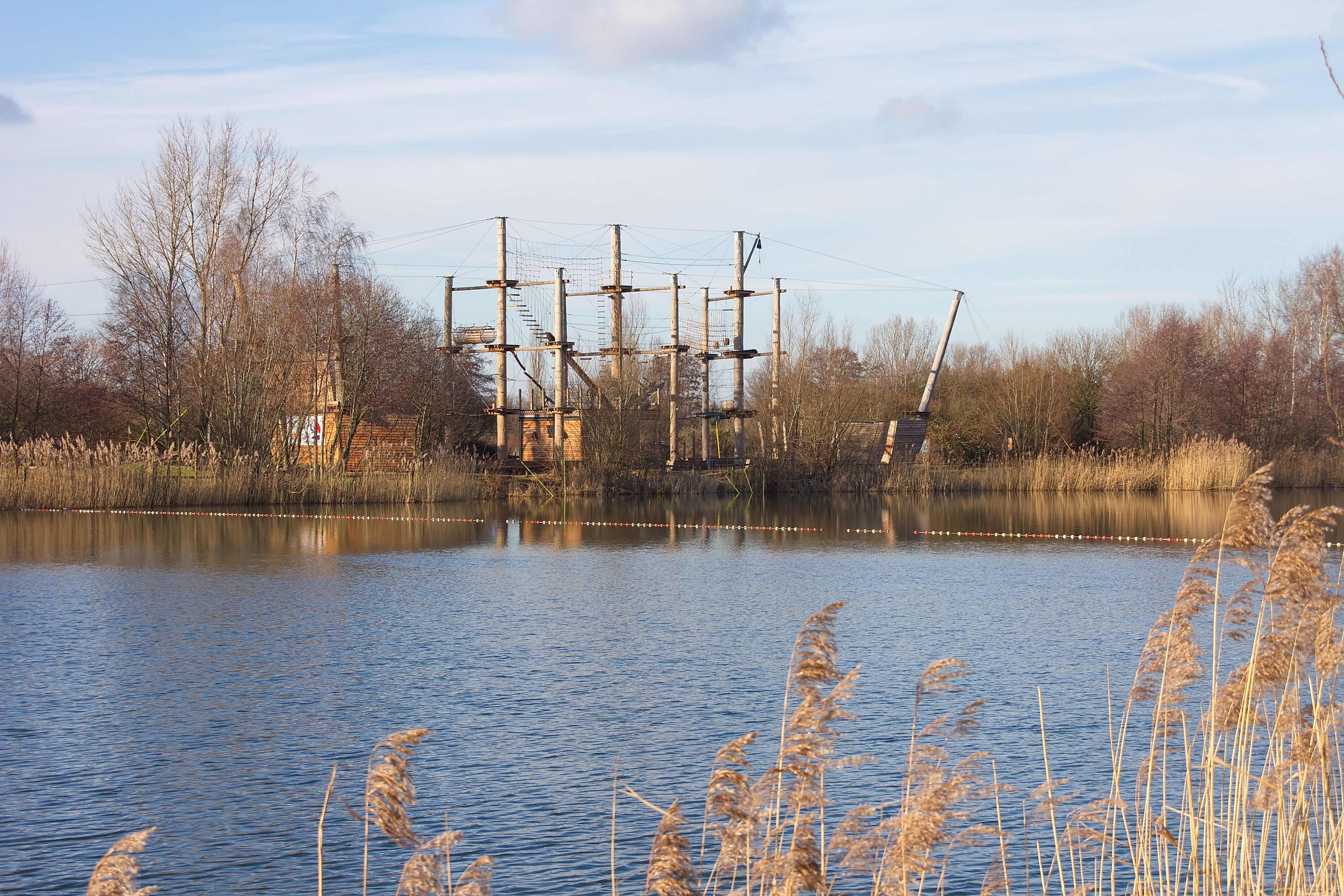 Hochseilgarten am Hufeisensee Niedernhägener Bauerschaft (Isernhagen), Niedersachsen, Deutschland